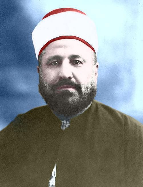 Portrait de Mohammed Rachid Rida